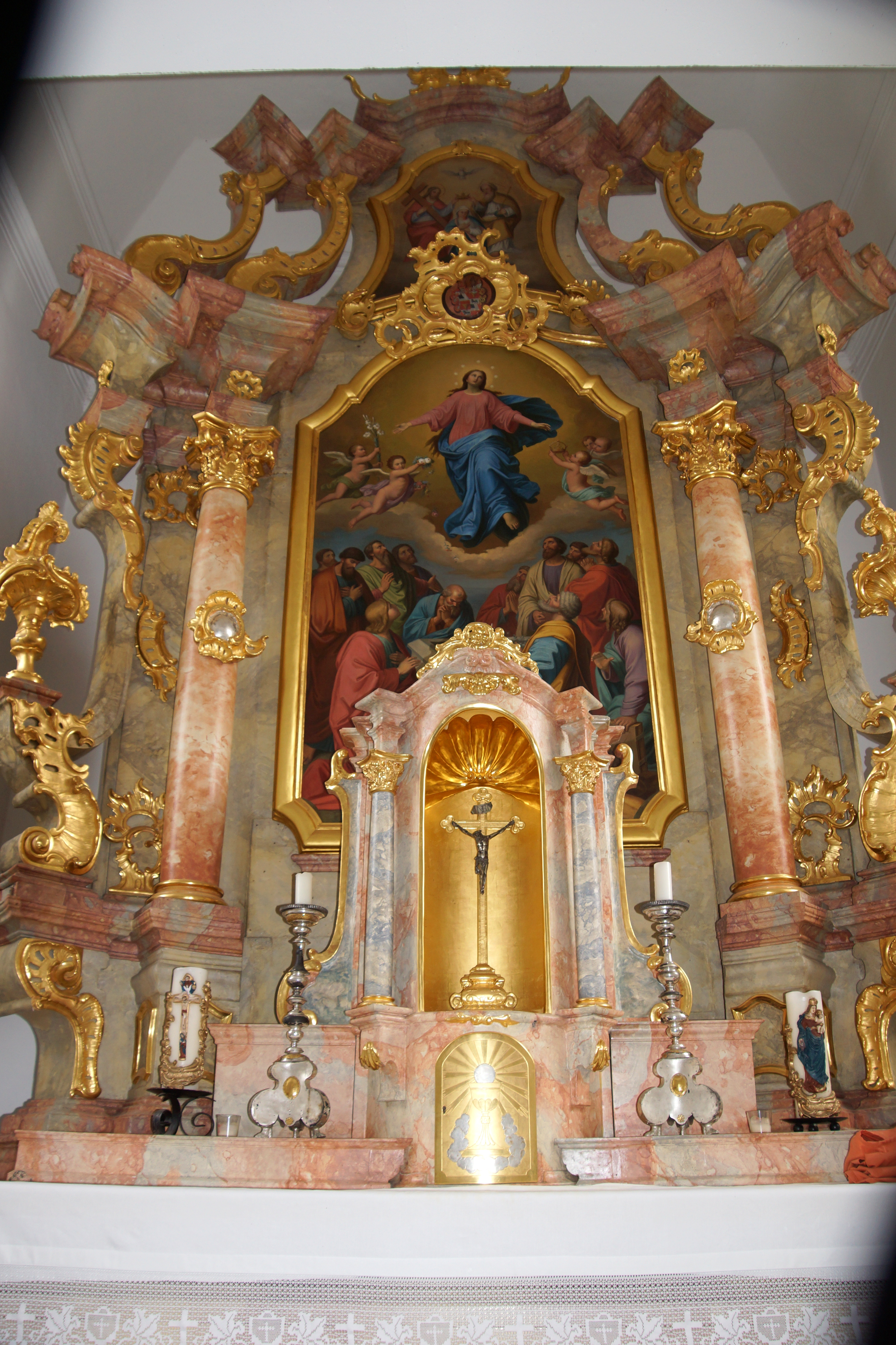 Die katholische Pfarrkirche Mariä Himmelfahrt in Hohenkemnath bei Amberg